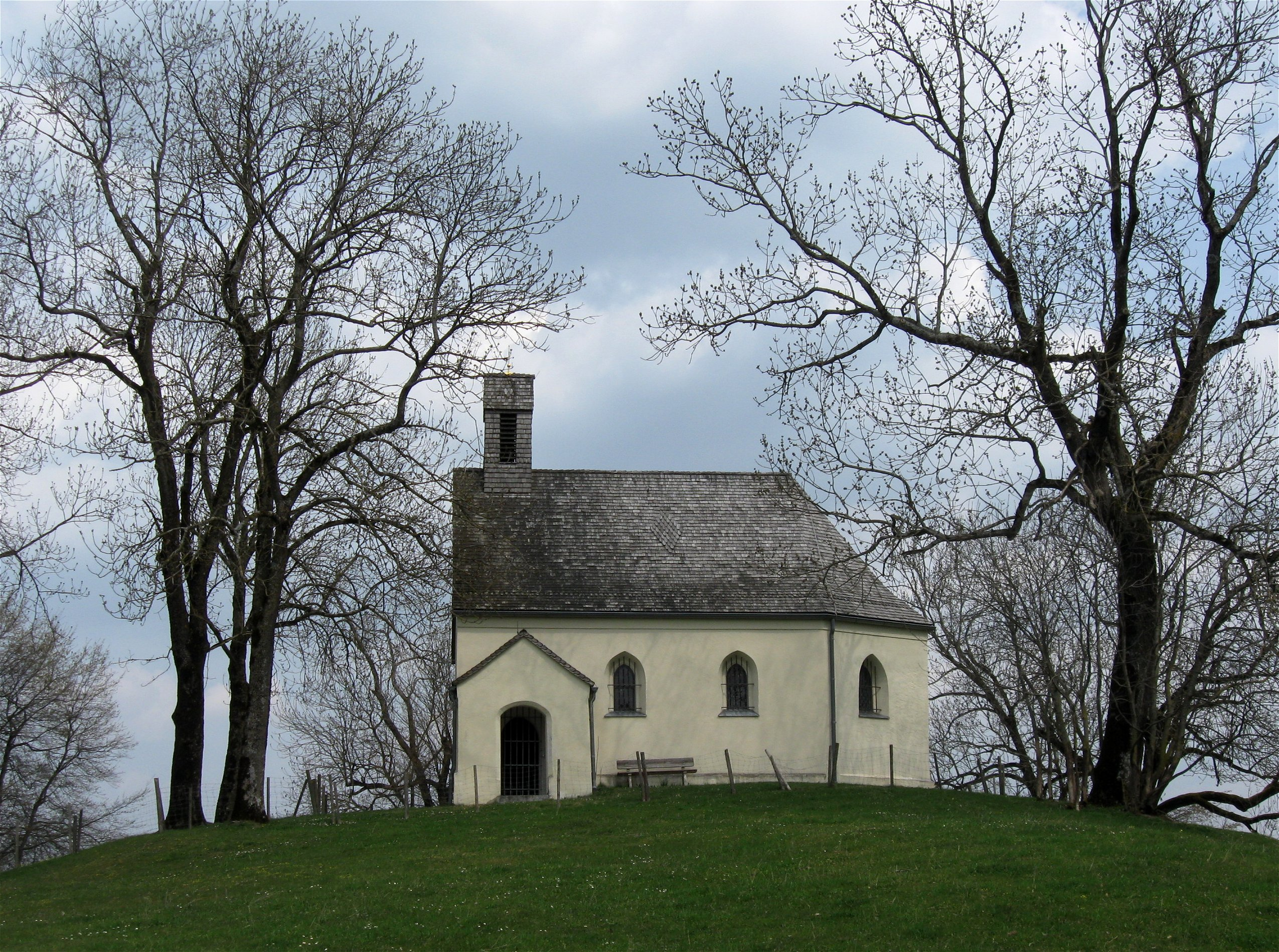 Kapelle St. Georg in Eulenschwang, einem Ortsteil von Egling